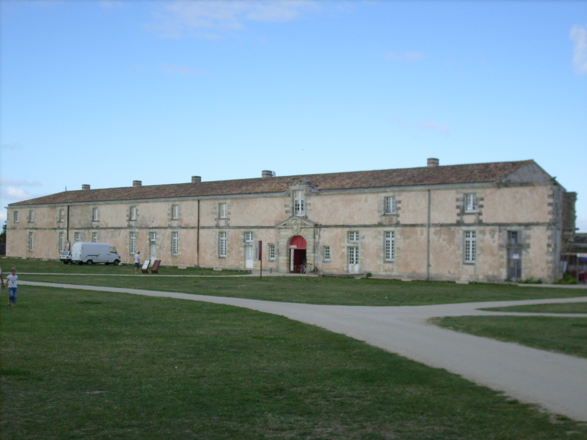 Arsenal, Citadelle du Château-d'Oléron